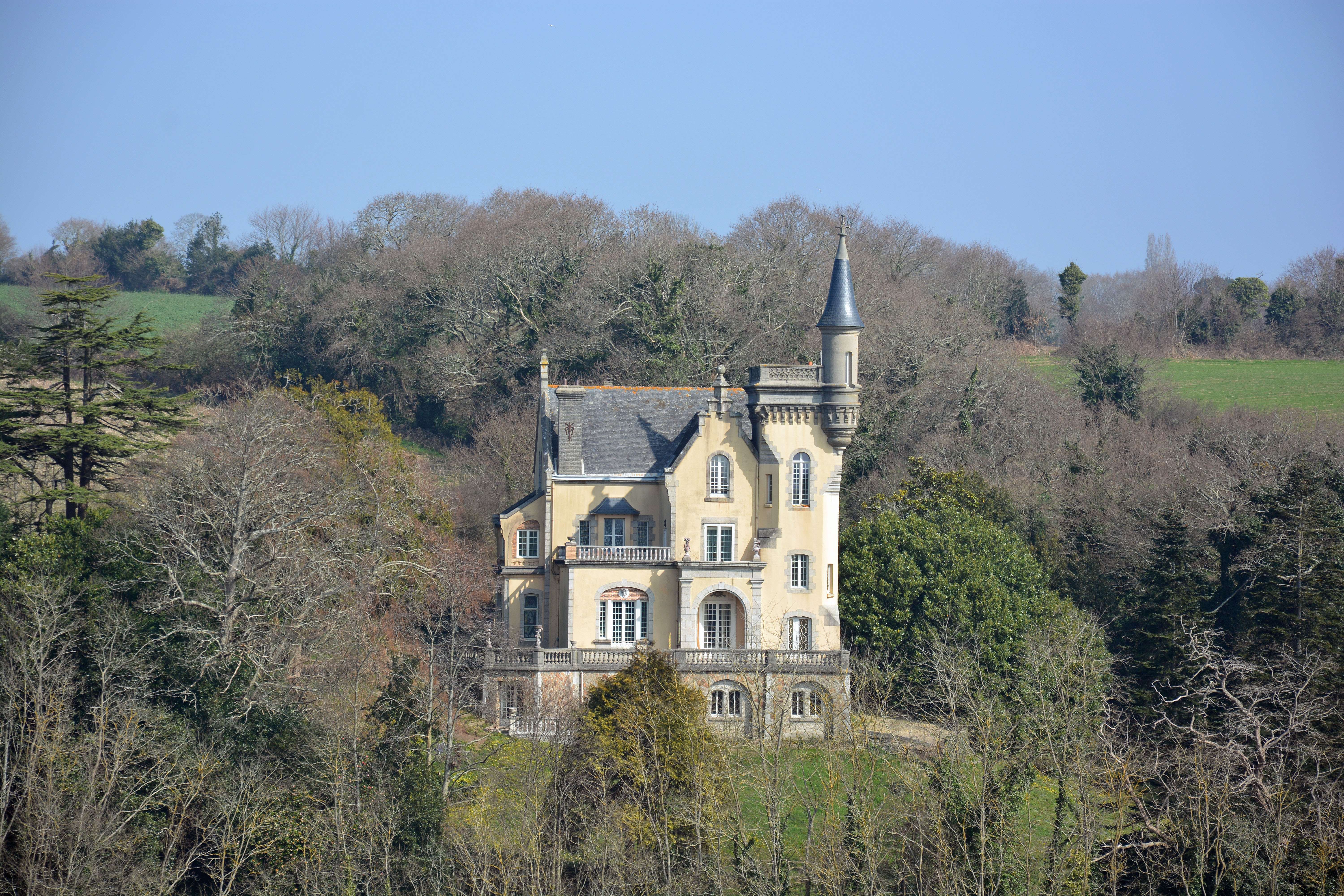 Manoir de Stang-al-Lin